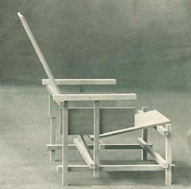 Leunsteul van Rietveld. Circa 1918.